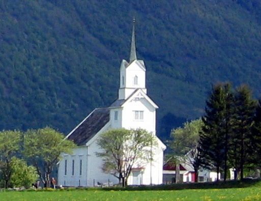 Oppstryn church